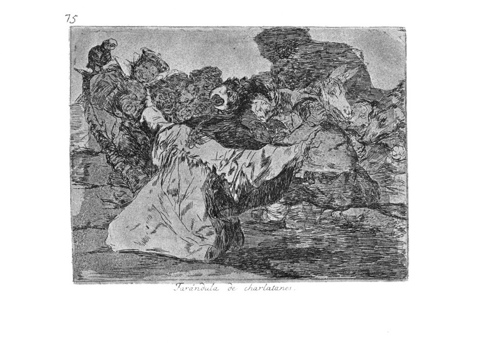 Plate 75: Farándula de charlatanes (Troupe of charlatans)